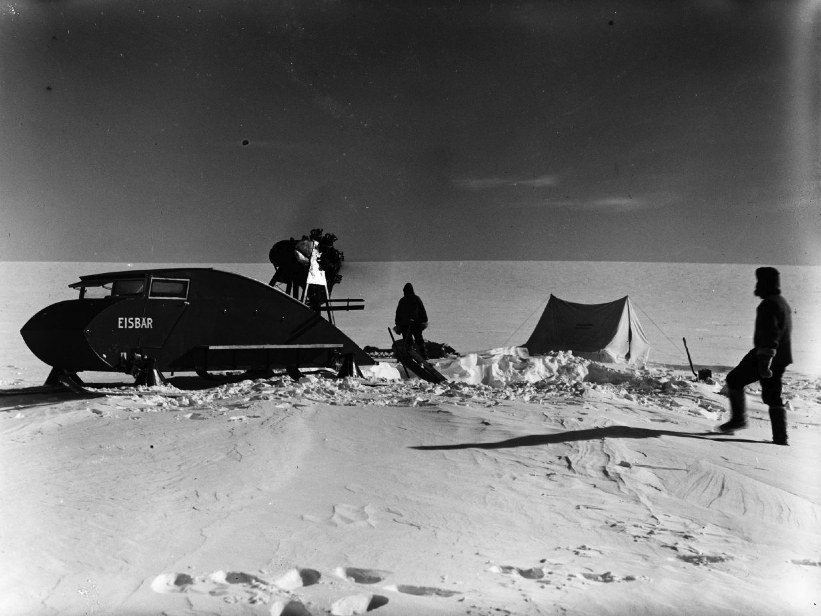 Photograph of the German expedition and overwintering in Greenland; Deutsche Grönlandexpedition Alfred Wegener; Motorschlitten "Eisbär"